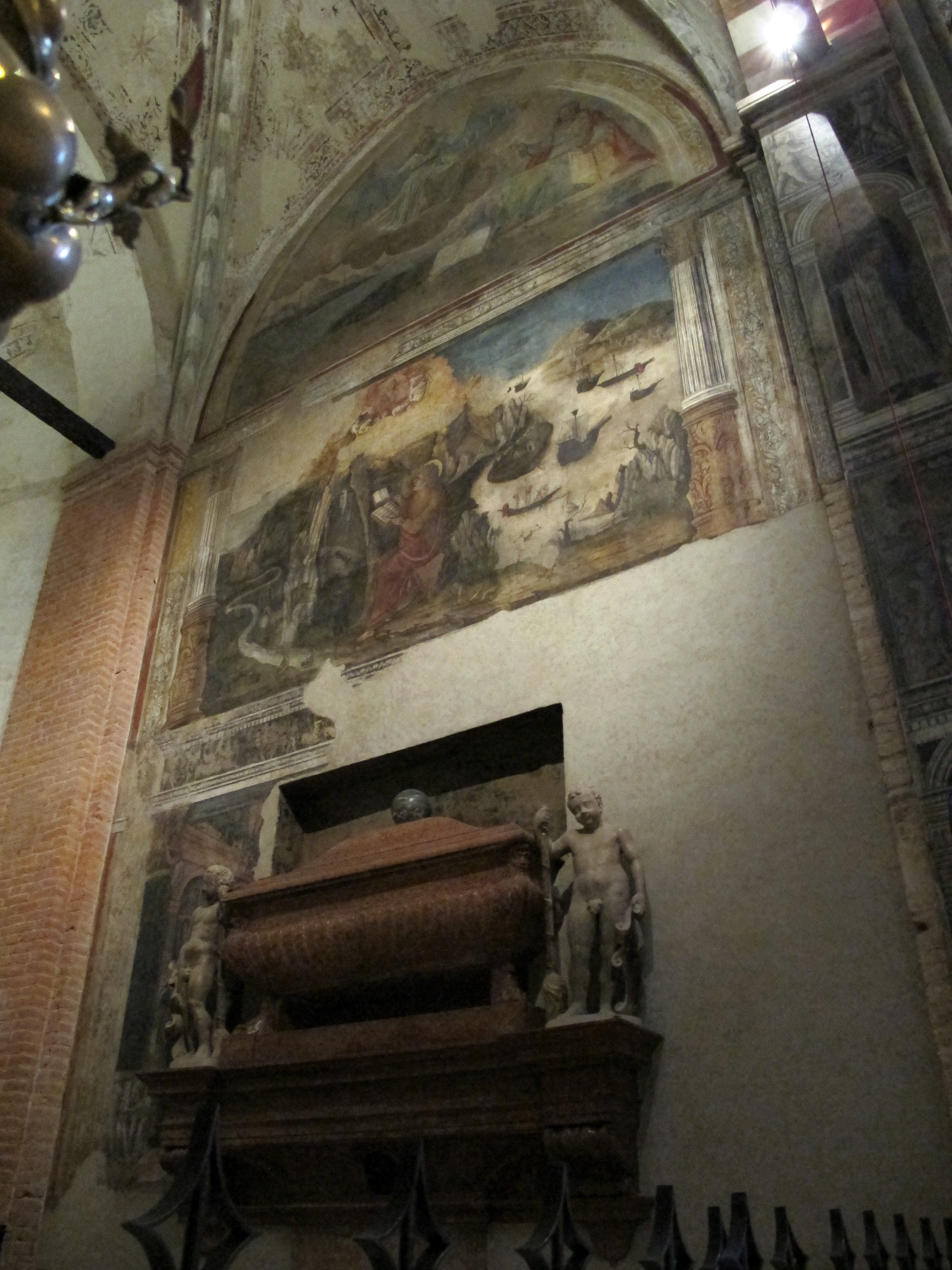 Santa Anastasia (Verona)